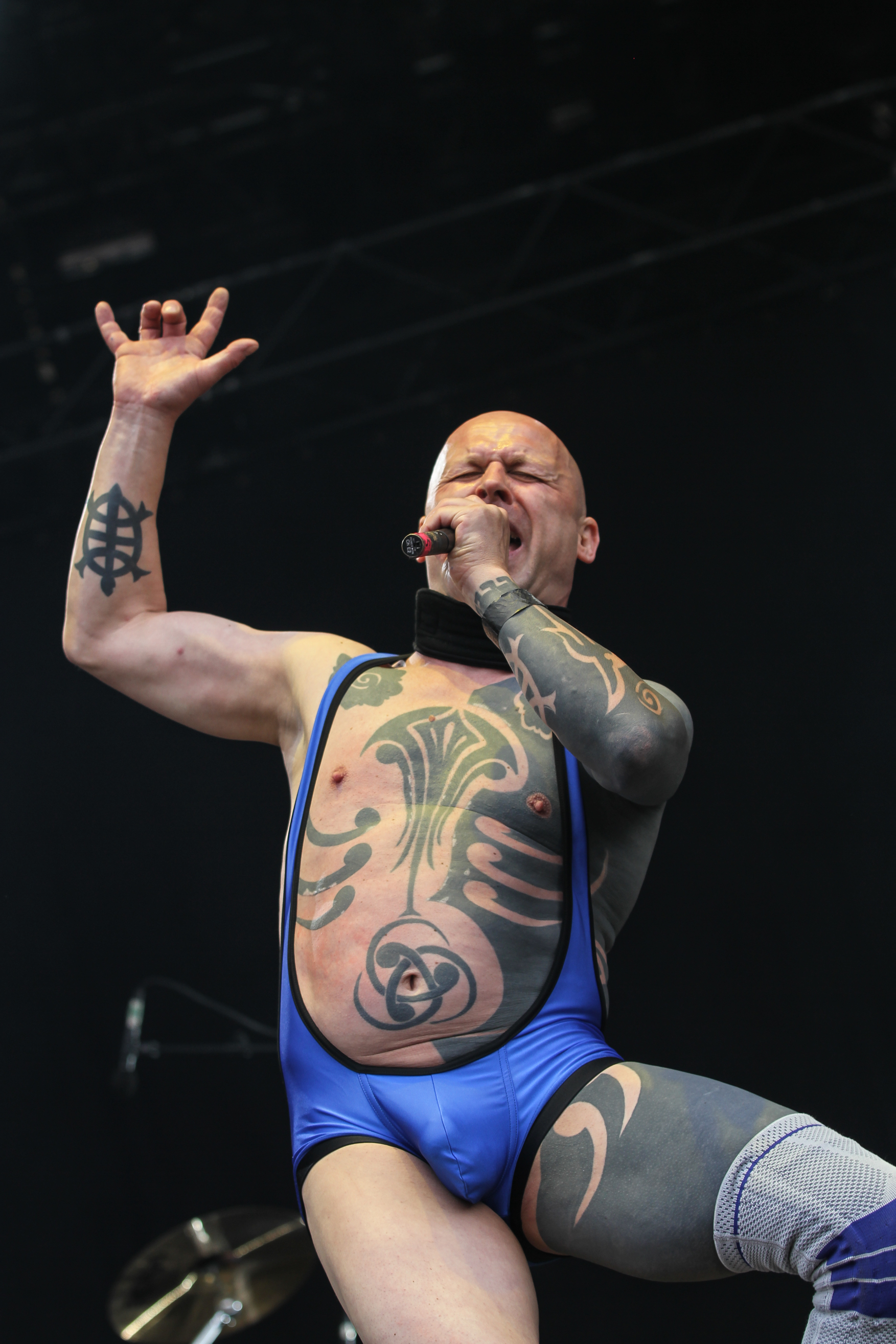 Knorkator beim With Full Force Festival 2013